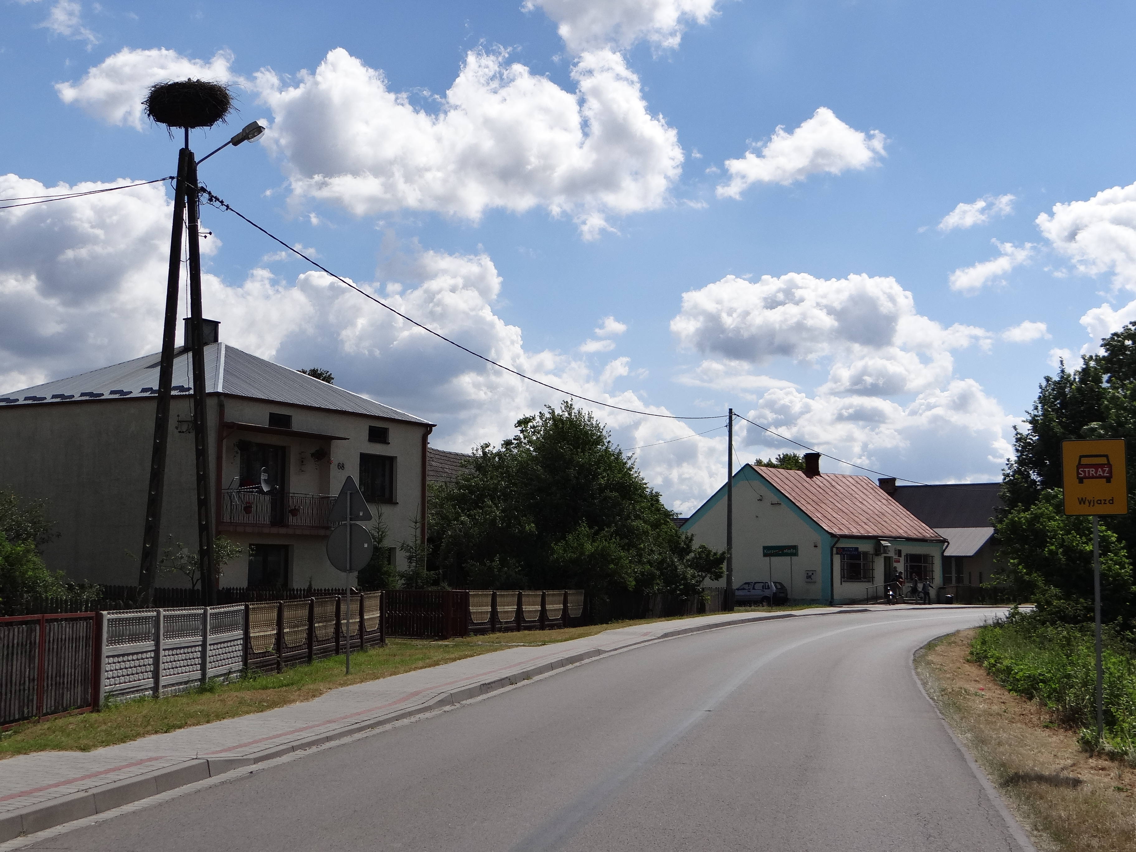 Bocianie gniazdo w miejscowości Kurzyna Mała.